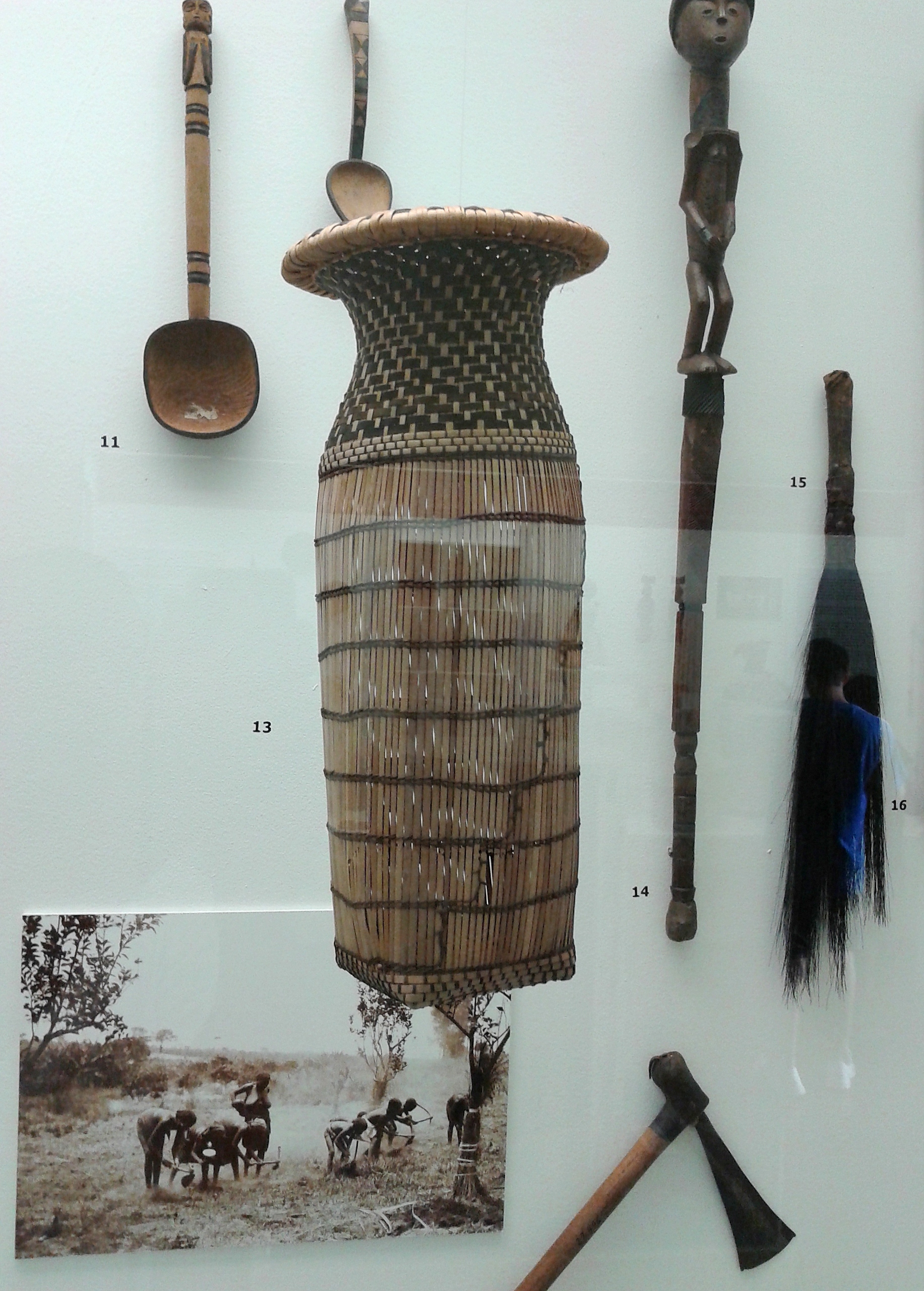 Português do Brasil: Coleção reunida por Celenia Pires Ferreira, missionária da Igreja Congregacional da cidade de Campina Grande, Paraíba, que viveu no Planalto Central de Angola entre 1929 e 1935. A coleção abarca objetos de uso doméstico e ritual. Doada ao Museu Nacional/UFRJ em 1936.